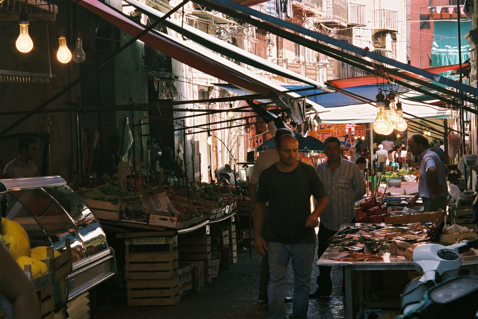 Palermo Fish market